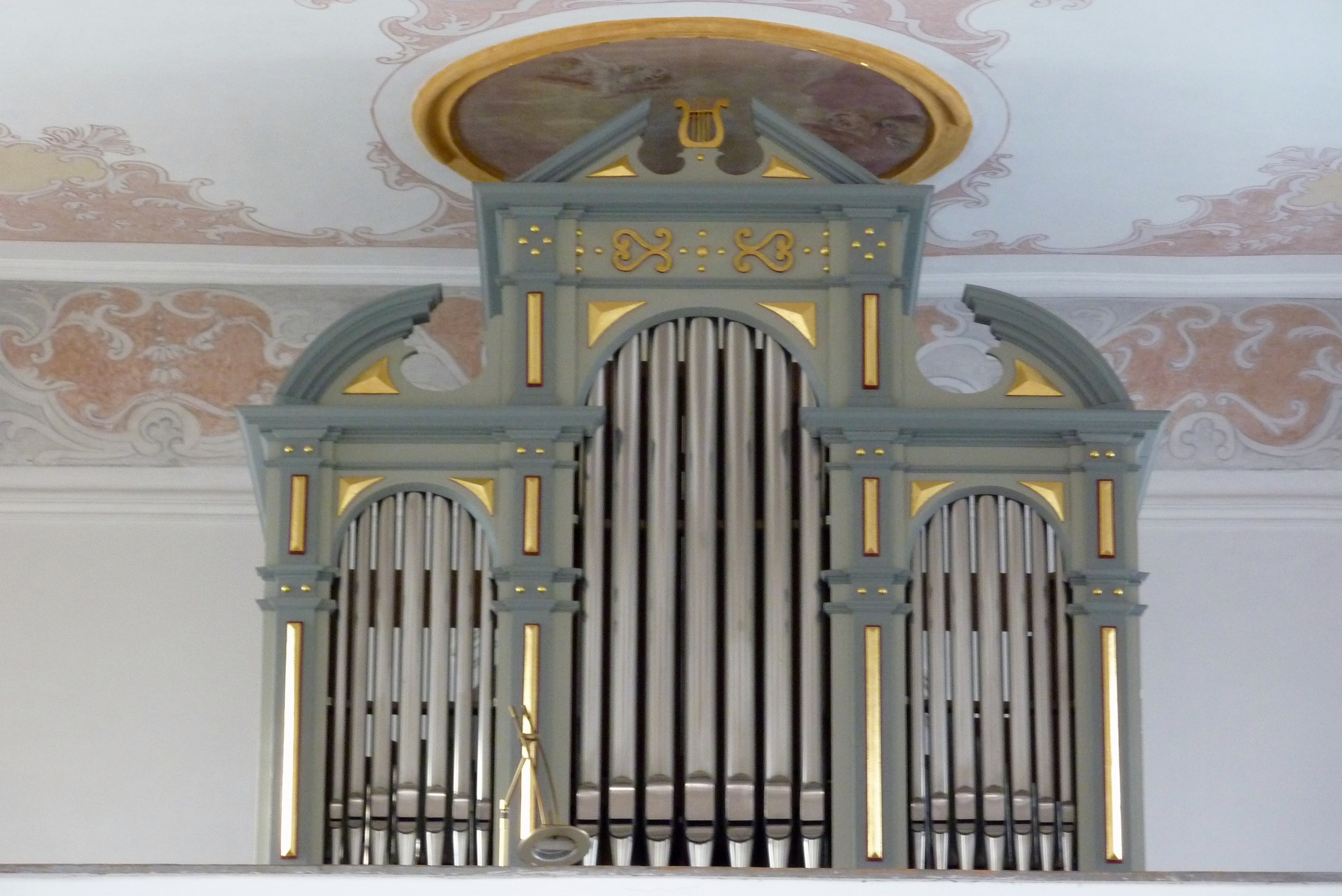 Katholische Pfarrkirche St. Leonhard in Baiershofen, einem Ortsteil der Gemeinde Altenmünster im Landkreis Augsburg (Bayern), Orgel